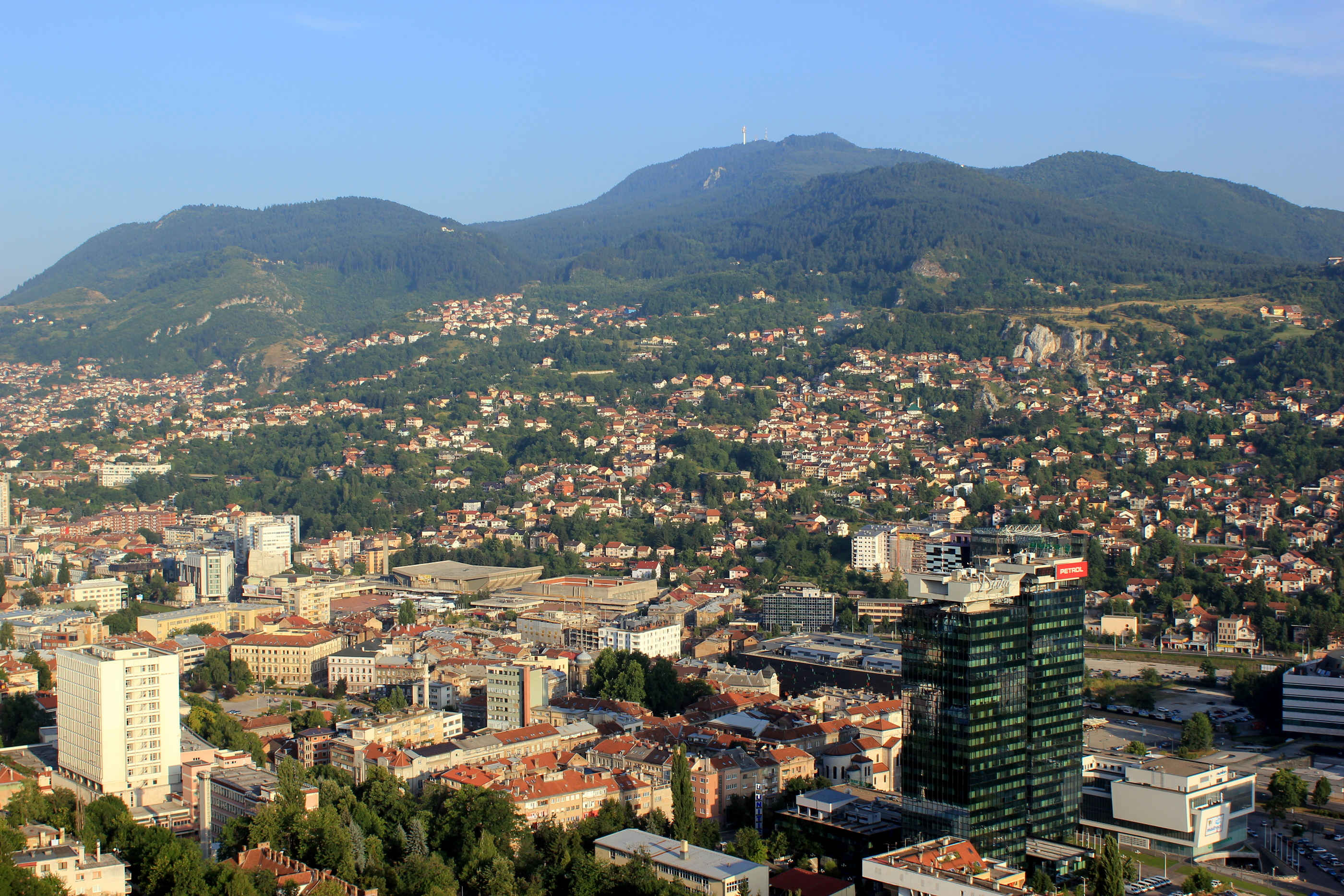 Blick über Sarajevo zum Trebević.